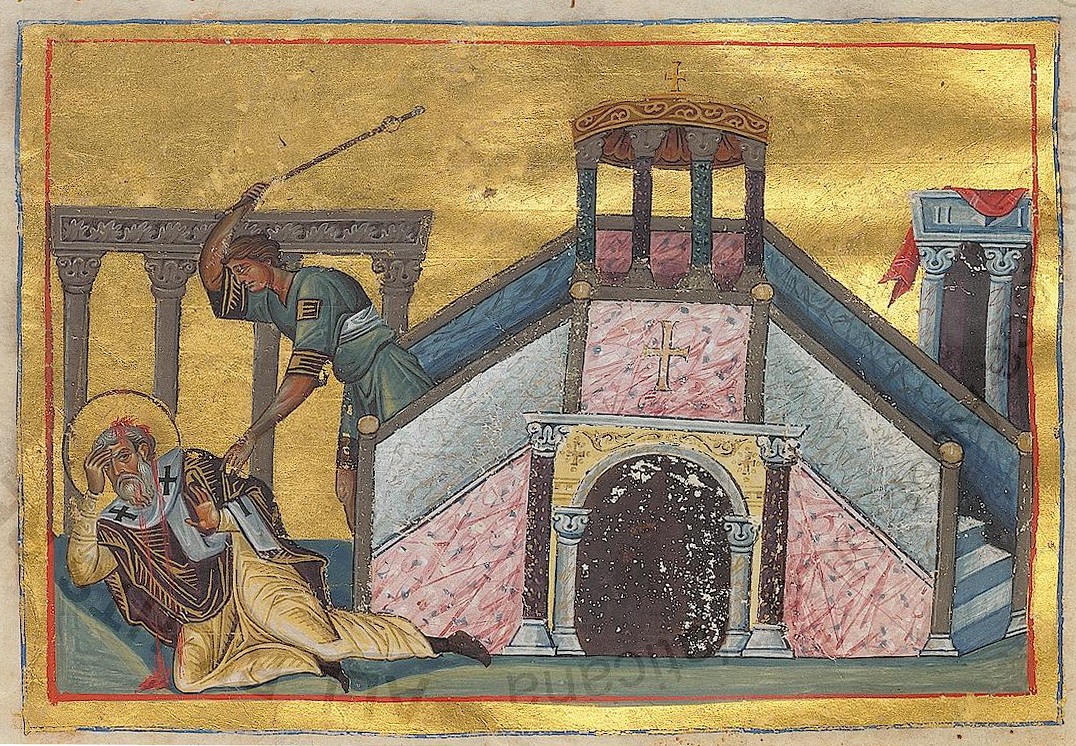 Апостол Иаков, брат Господень Константинополь. 985 г. Миниатюра Минология Василия II. Ватиканская библиотека. Рим.